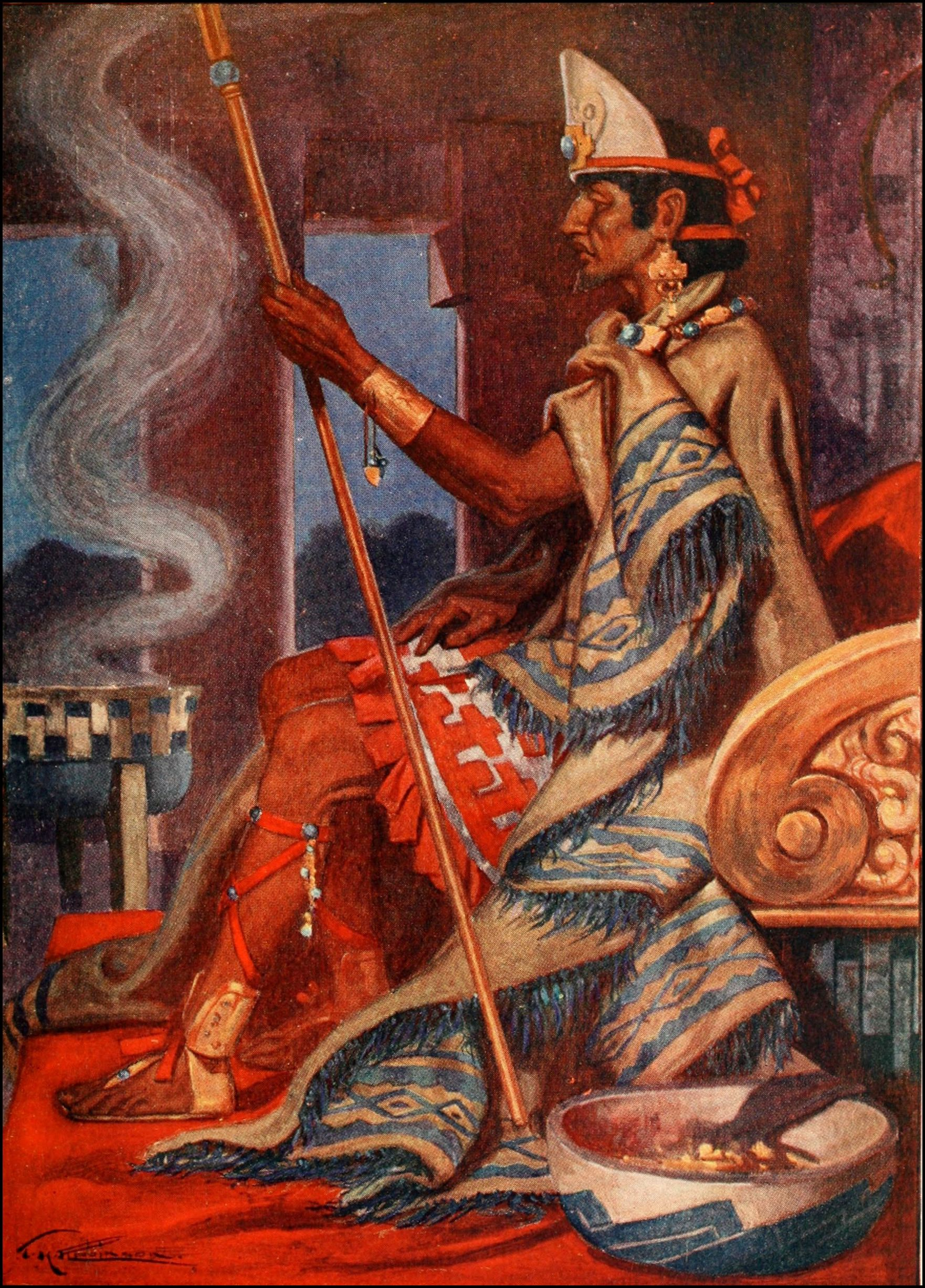 Montezuma